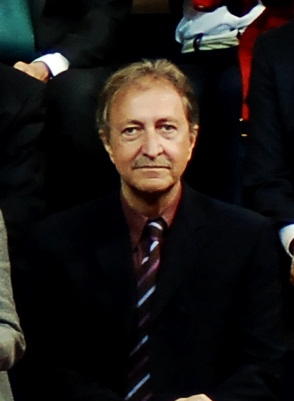 Tesoros vivos de la Televisión